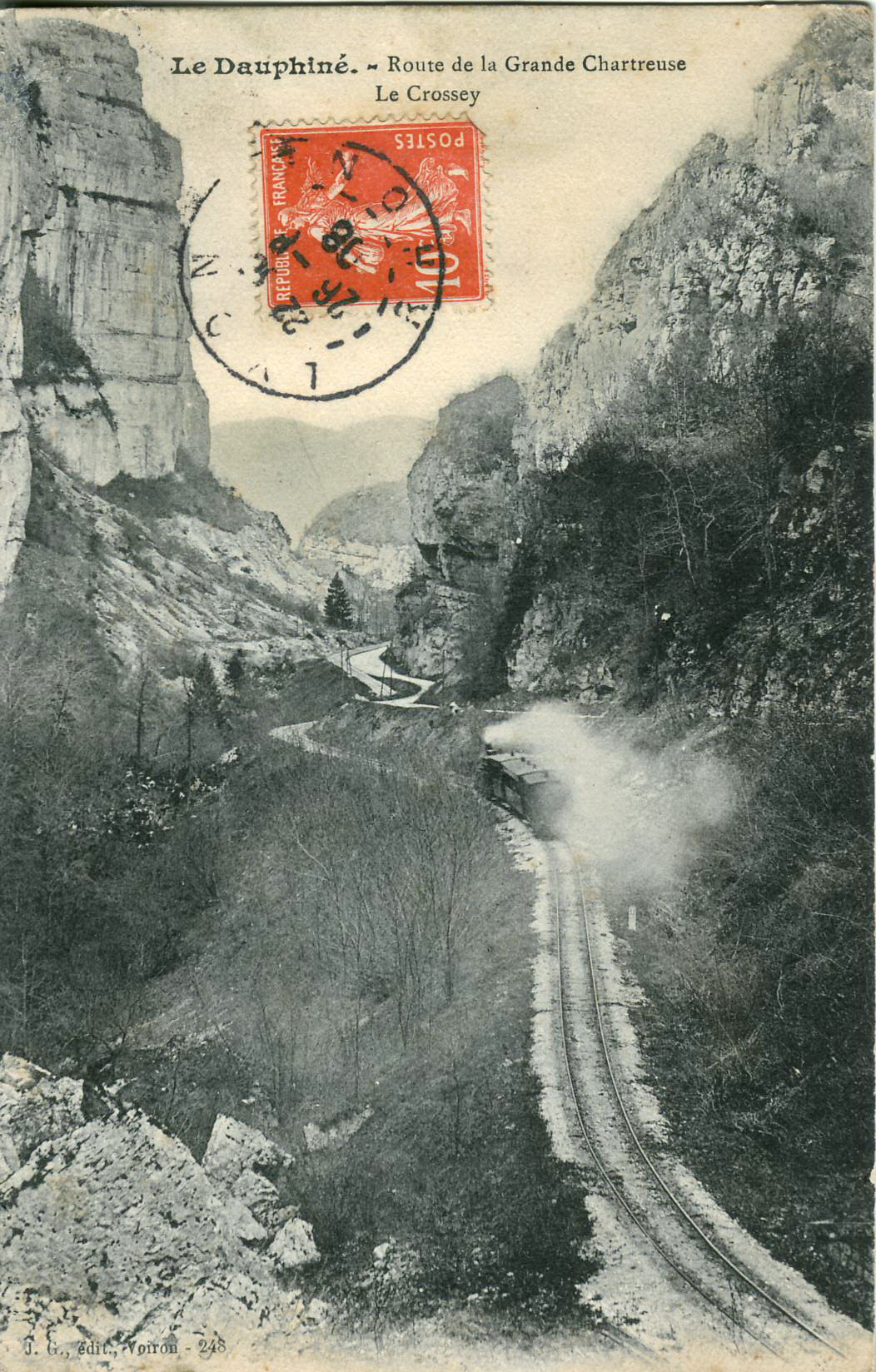 Carte postale éditée par JG, éditeur à Voiron, n°248 : LE DAUPHINE - Route de la Grande Chartreuse - Le Crossey